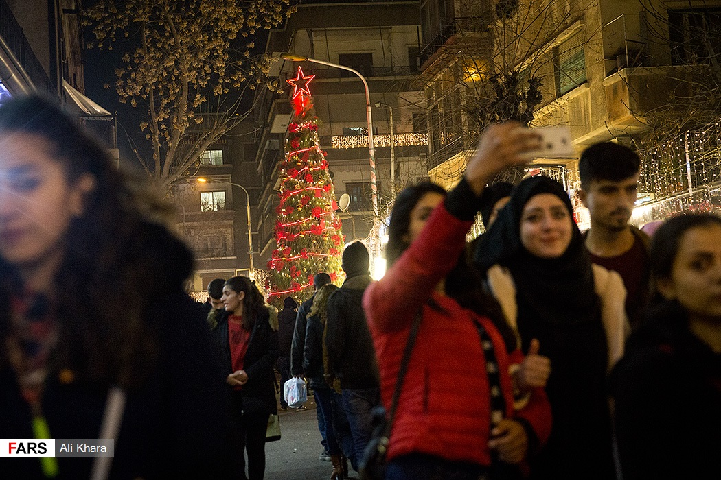 اولین کریسمس آرام دمشق پس از ۷ سال جنگ